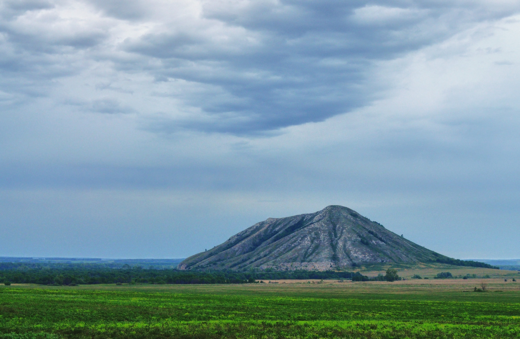 Юрактау